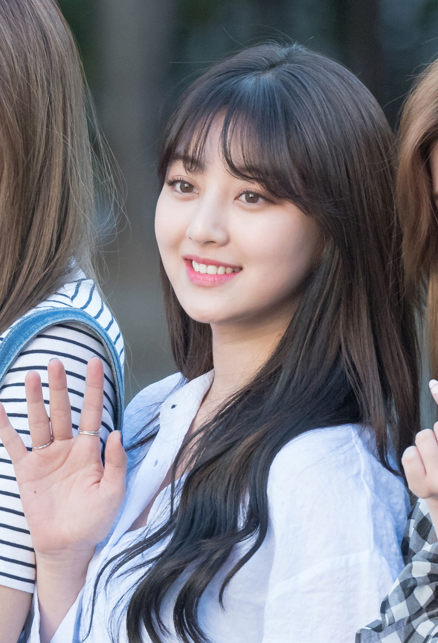 (17.05.26)뮤직뱅크 TWICE